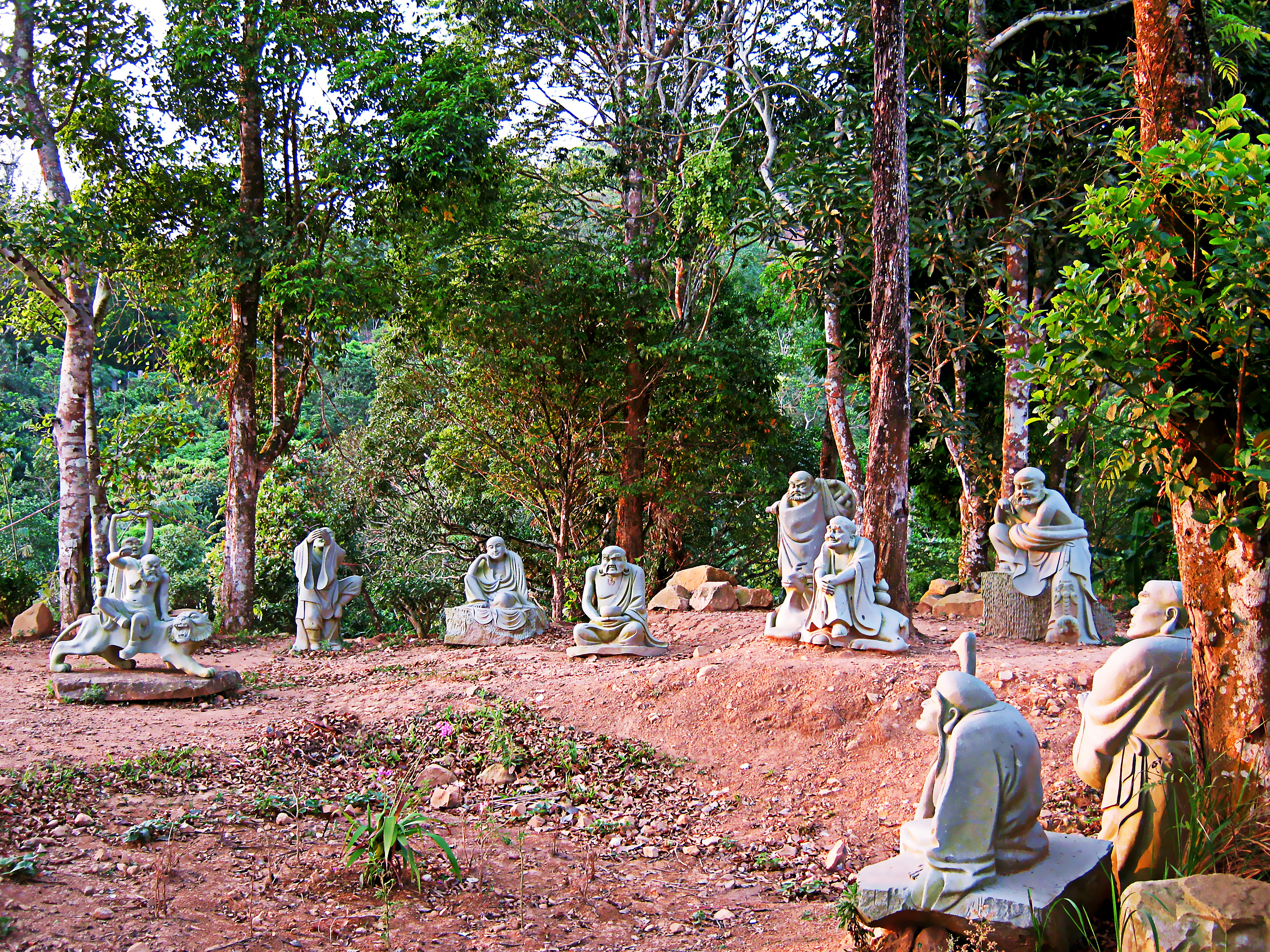 Bộ tượng La hán bằng đá trong khuôn viên chùa Vạn Linh trên đỉnh núi Cấm (An Giang, Việt Nam).